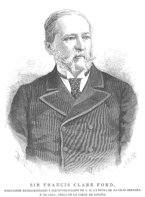 Retrato de Clare Ford, embajador del Reino Unido en España, recogido en la revista española La Ilustración Española y Americana.